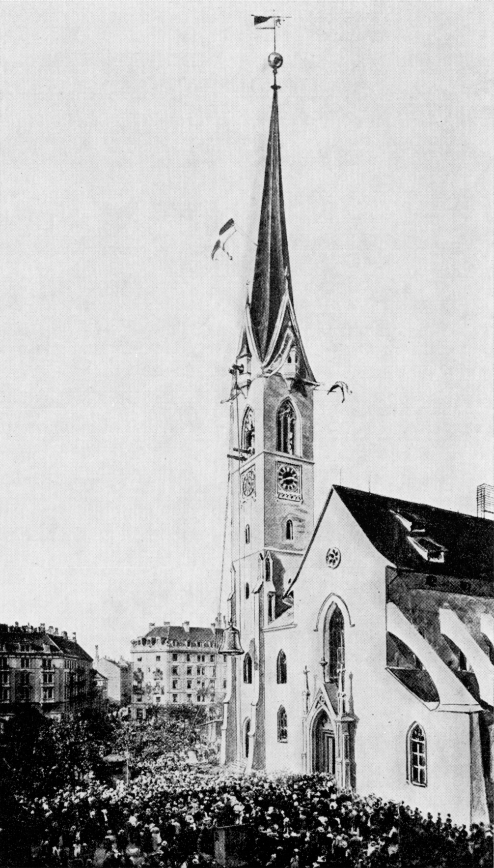 Glockenaufzug am neu erstellten Turm der Predigerkirche in Zürich am 11. Oktober 1900, 14.40 Uhr.